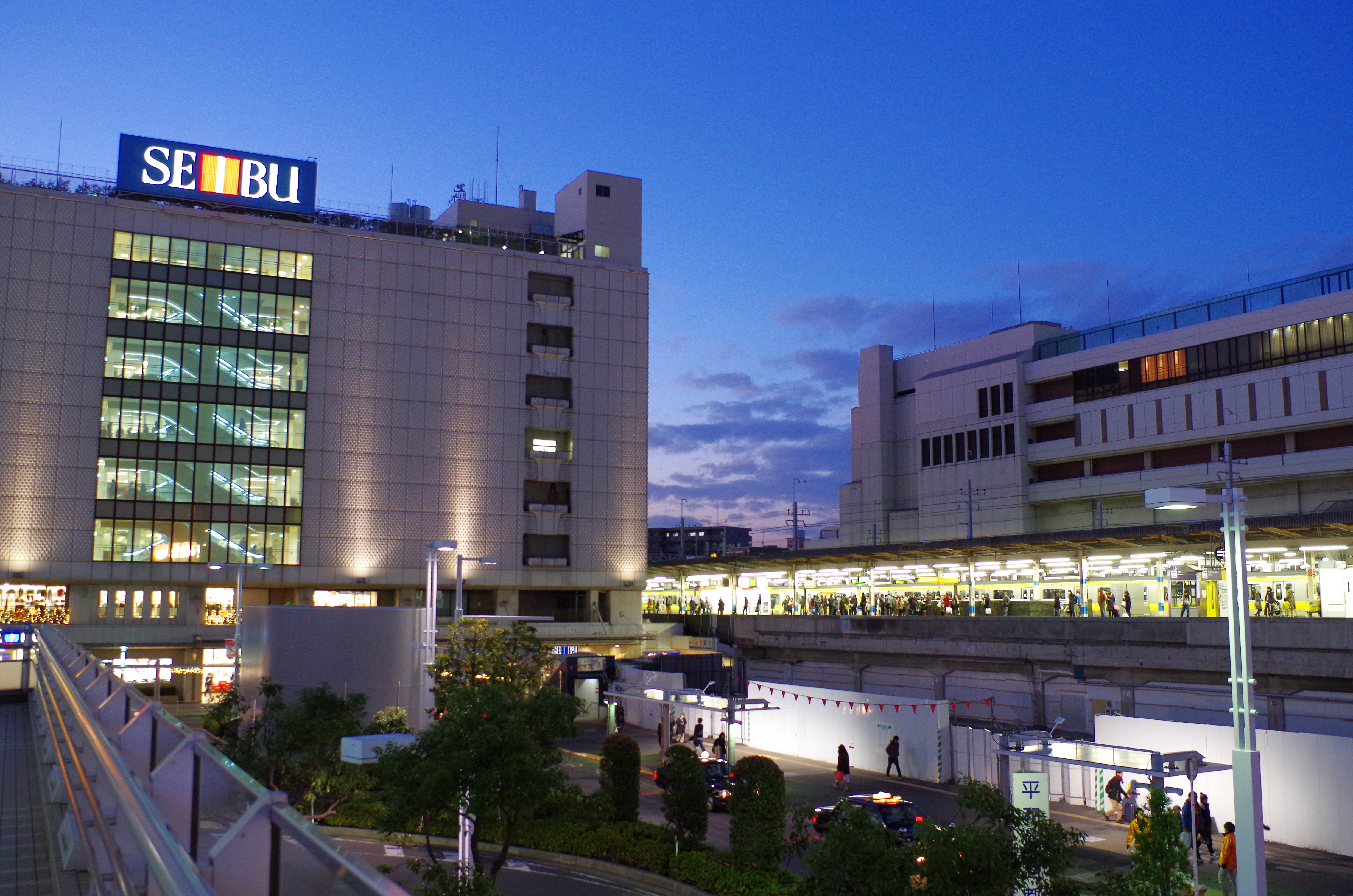 船橋駅 2015.1.02